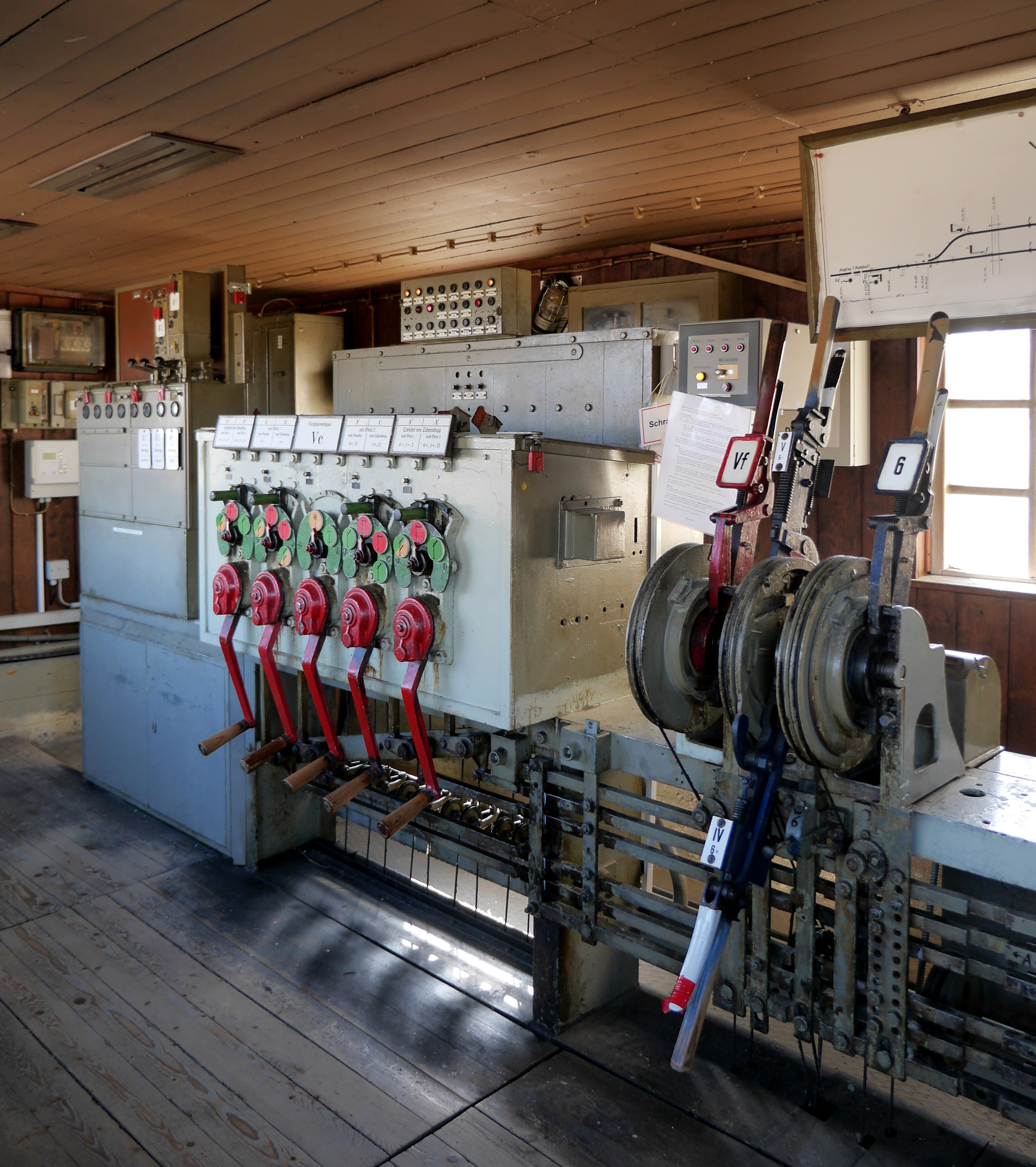 Mechanisches Stellwerk der Bauart Krauss von 1900 im Bahnhof Weidenbach, links der Bahnhofsblock, in der Mitte das Kurbelwerk mit den Signalwinden, rechts die Hebelbank.